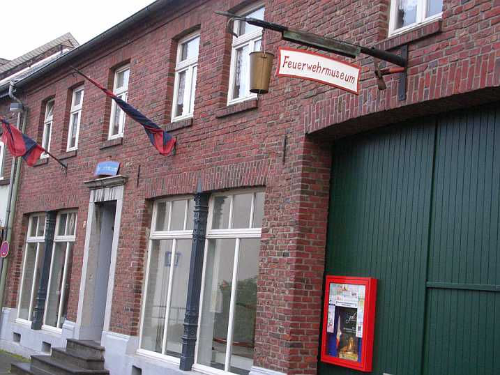 Feuerwehrmuseum Erkelenz-Lövenich